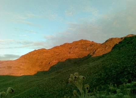 Teta de niquitao